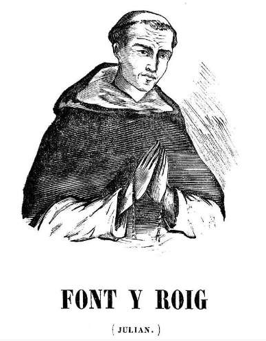 Julián Fontirroig. El Santo Mallorquín